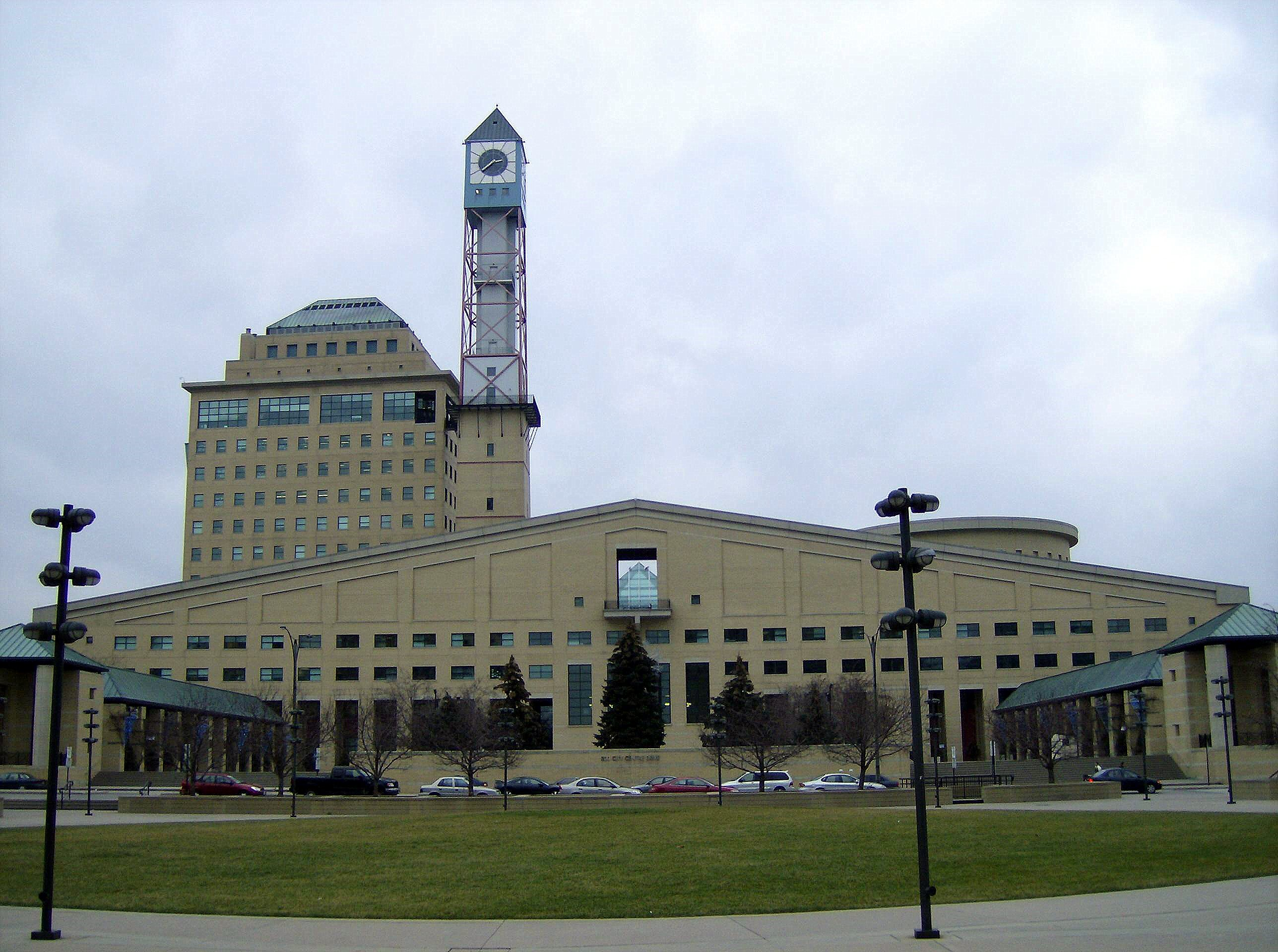 MississaugaCityHall.jpg